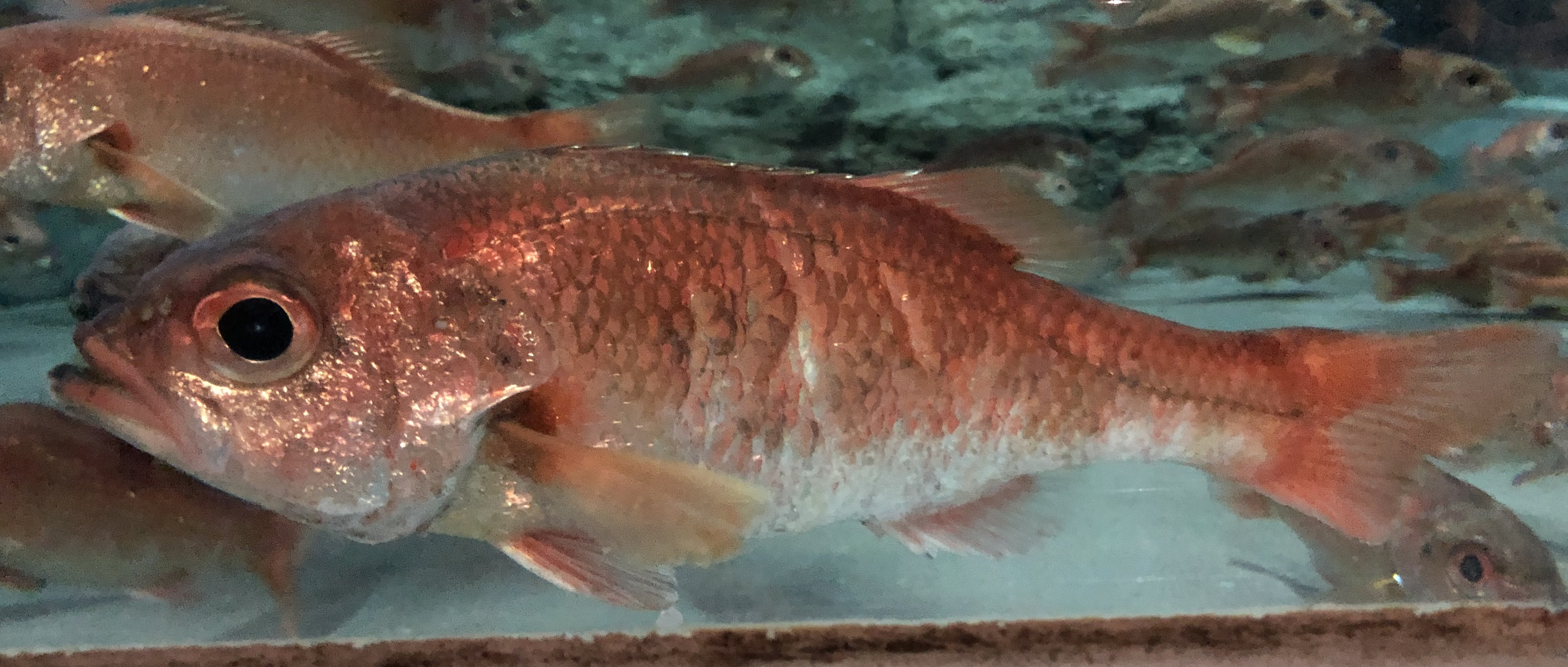 アカムツ。新潟市水族館 マリンピア日本海飼育展示個体。